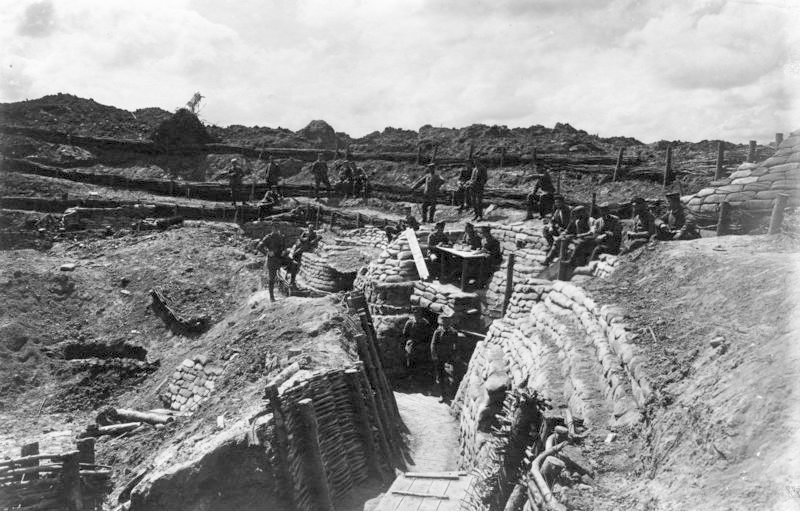 Großer Trichter / Hoogestellung Hans Hildebrand, Kriegsphotograph-Stuttgart